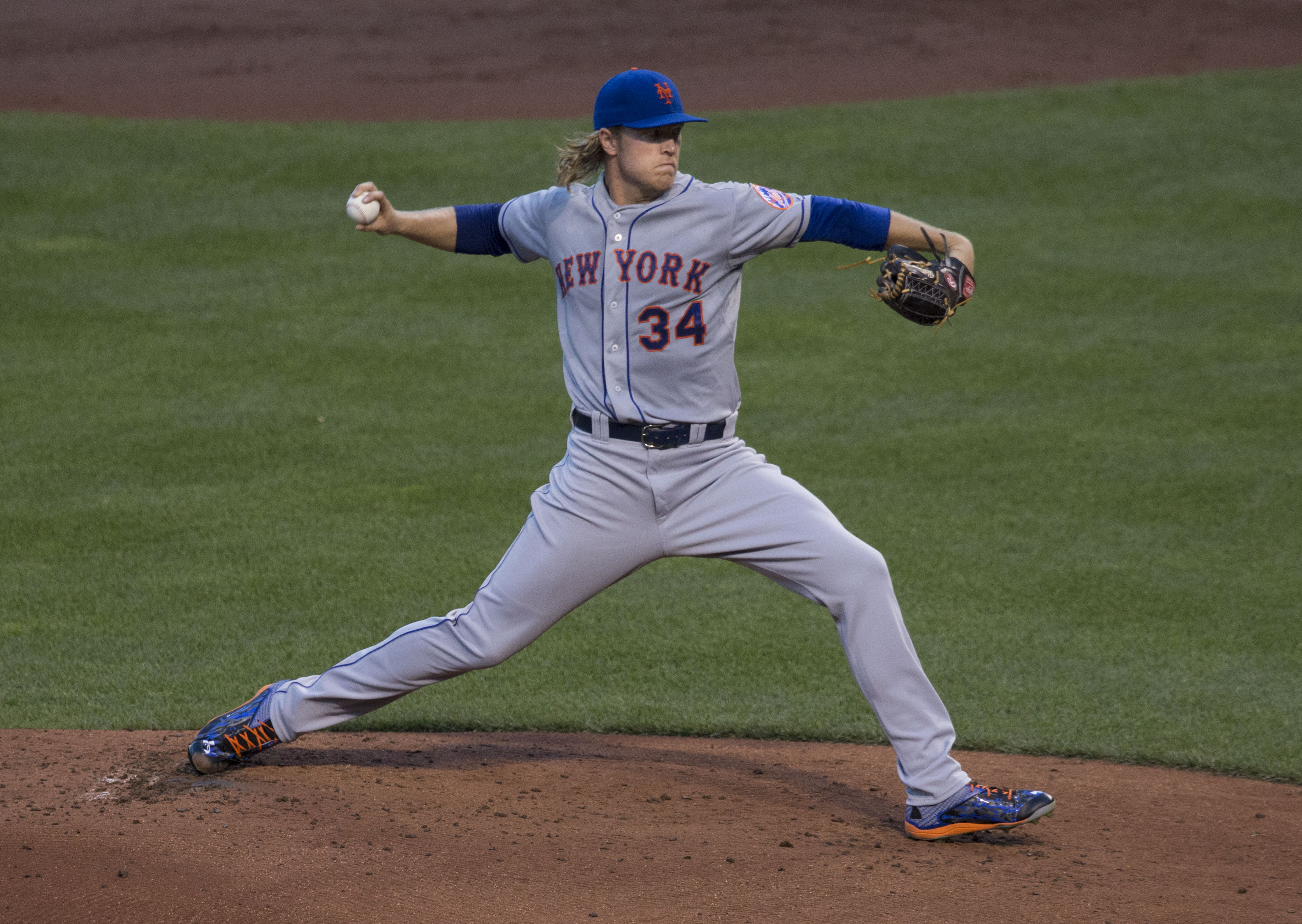 Mets at Orioles 8/19/15